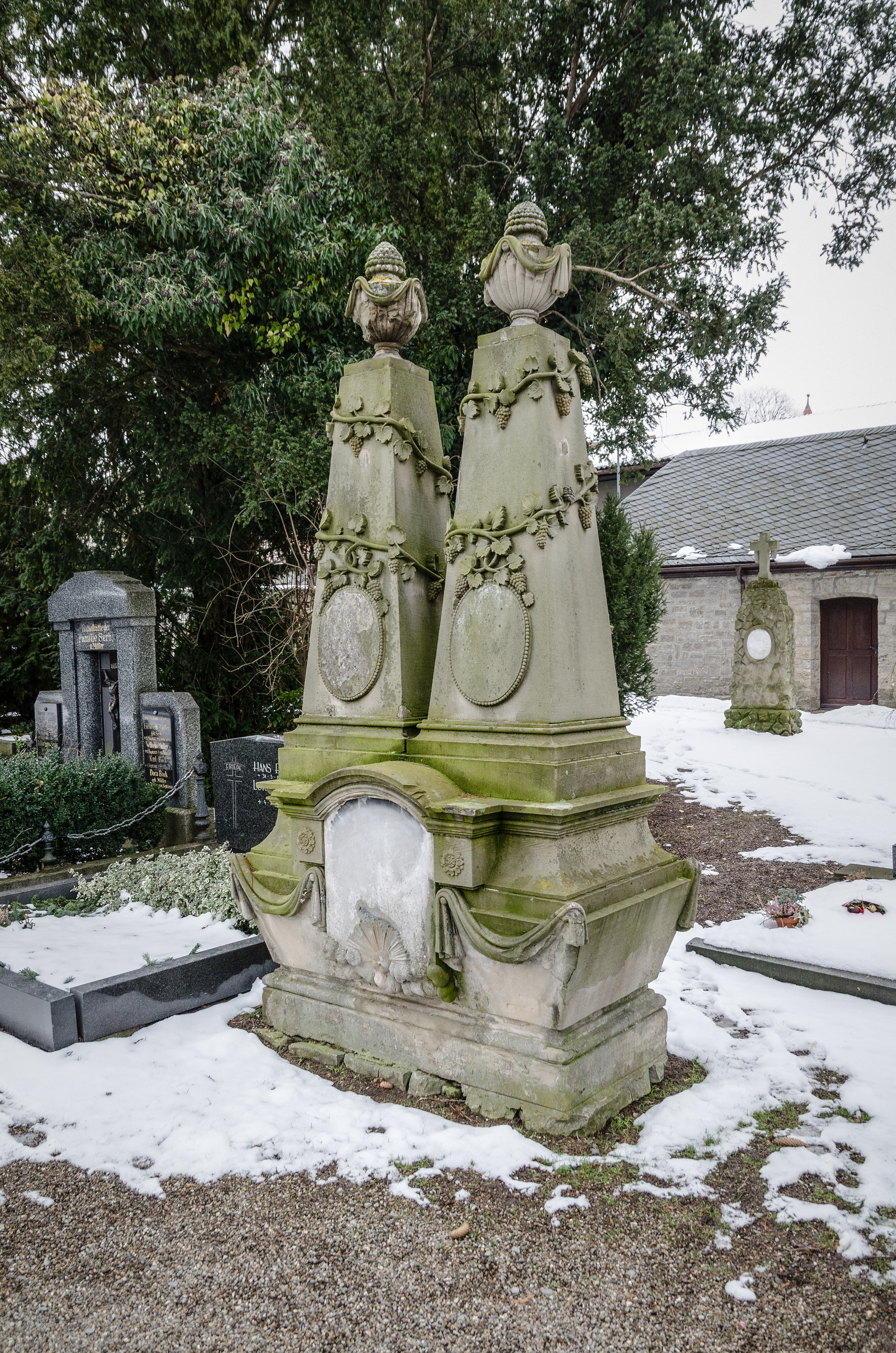 Mainbernheim, Friedhof, Kenotaph der Weinhändler Stintzig